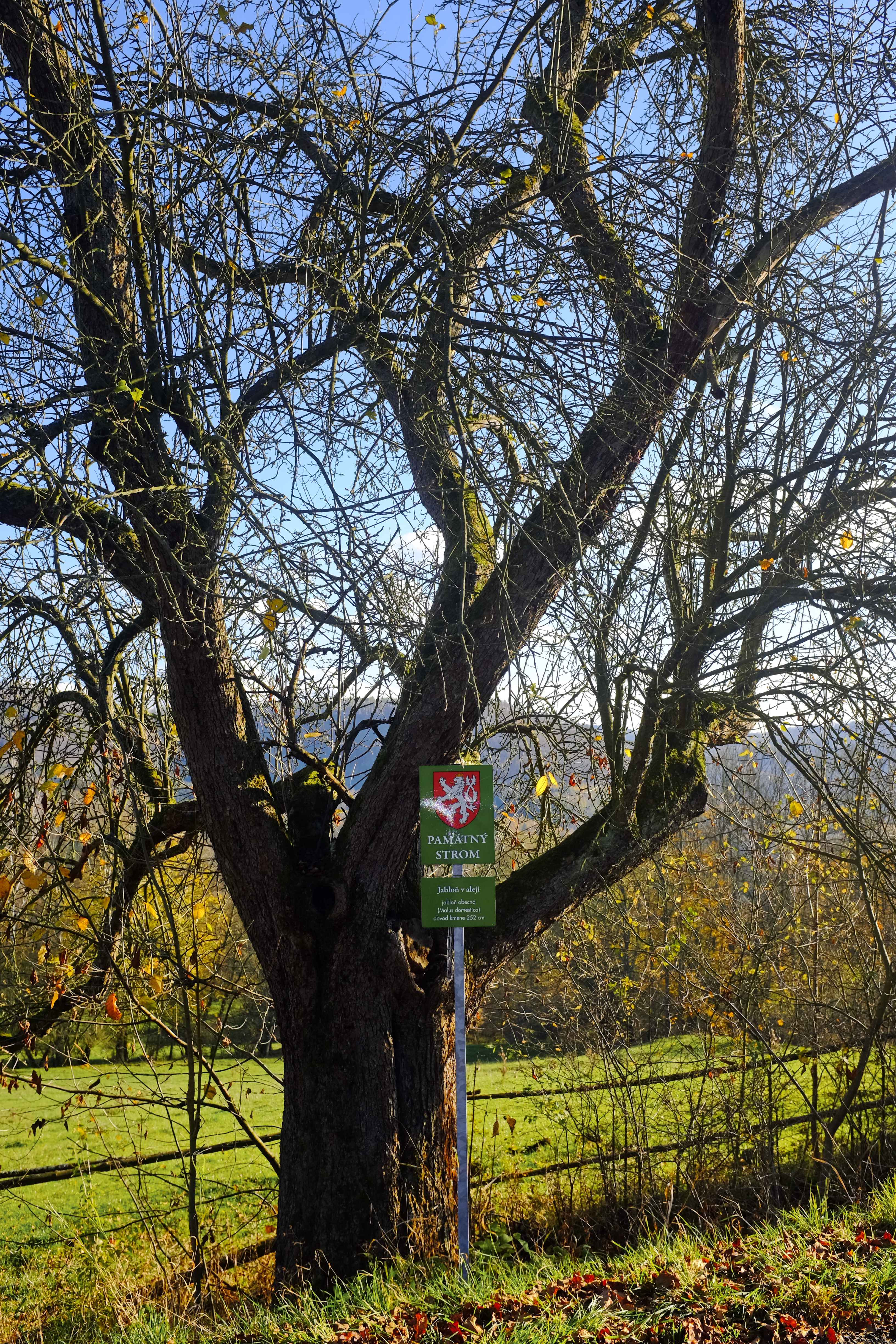 Památný strom - Jabloň v aleji, Nová Kyselka, část obce Kyselka, okres Karlovy Vary